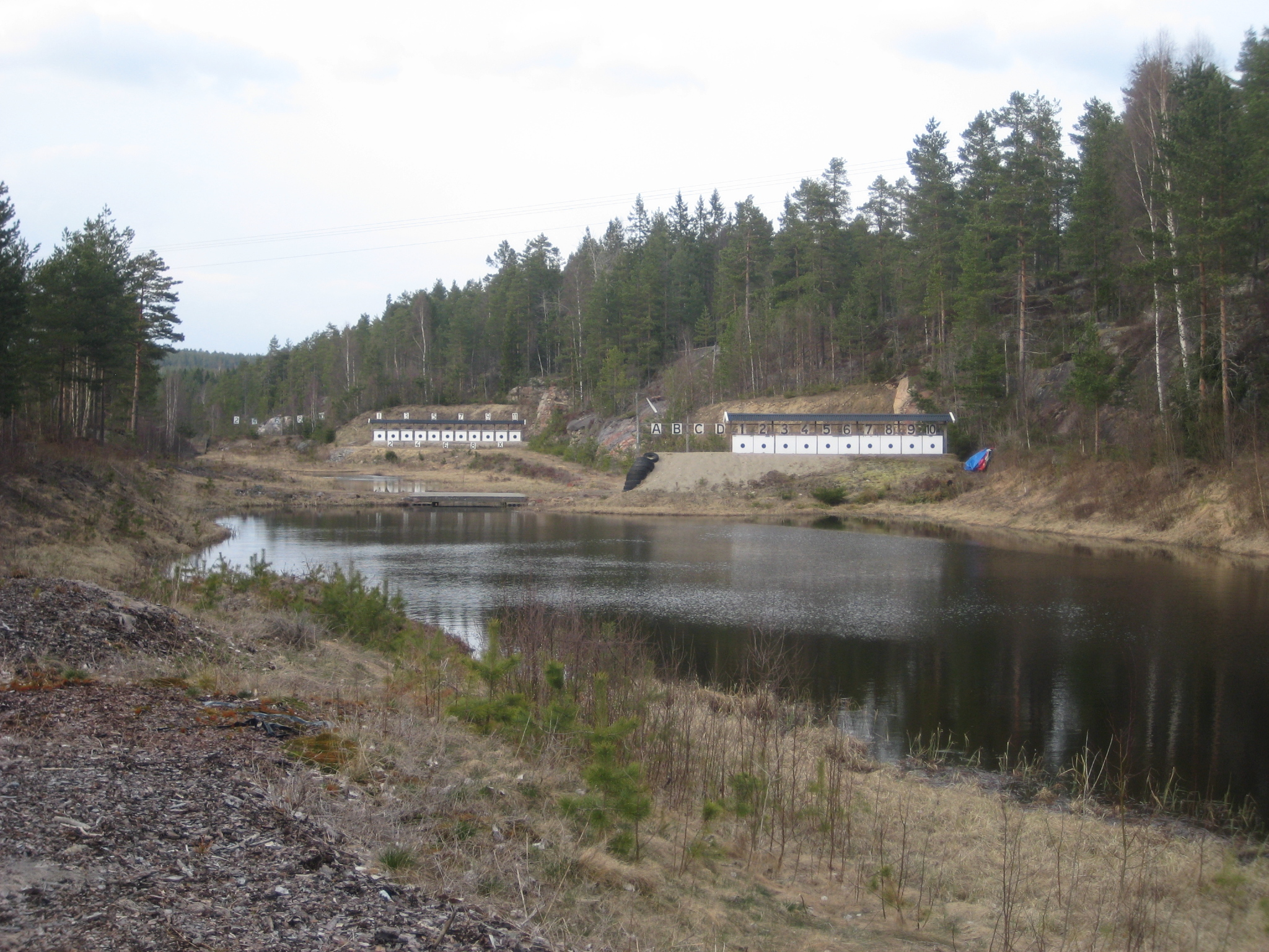 Bilde av skytterbane (Aurskog)